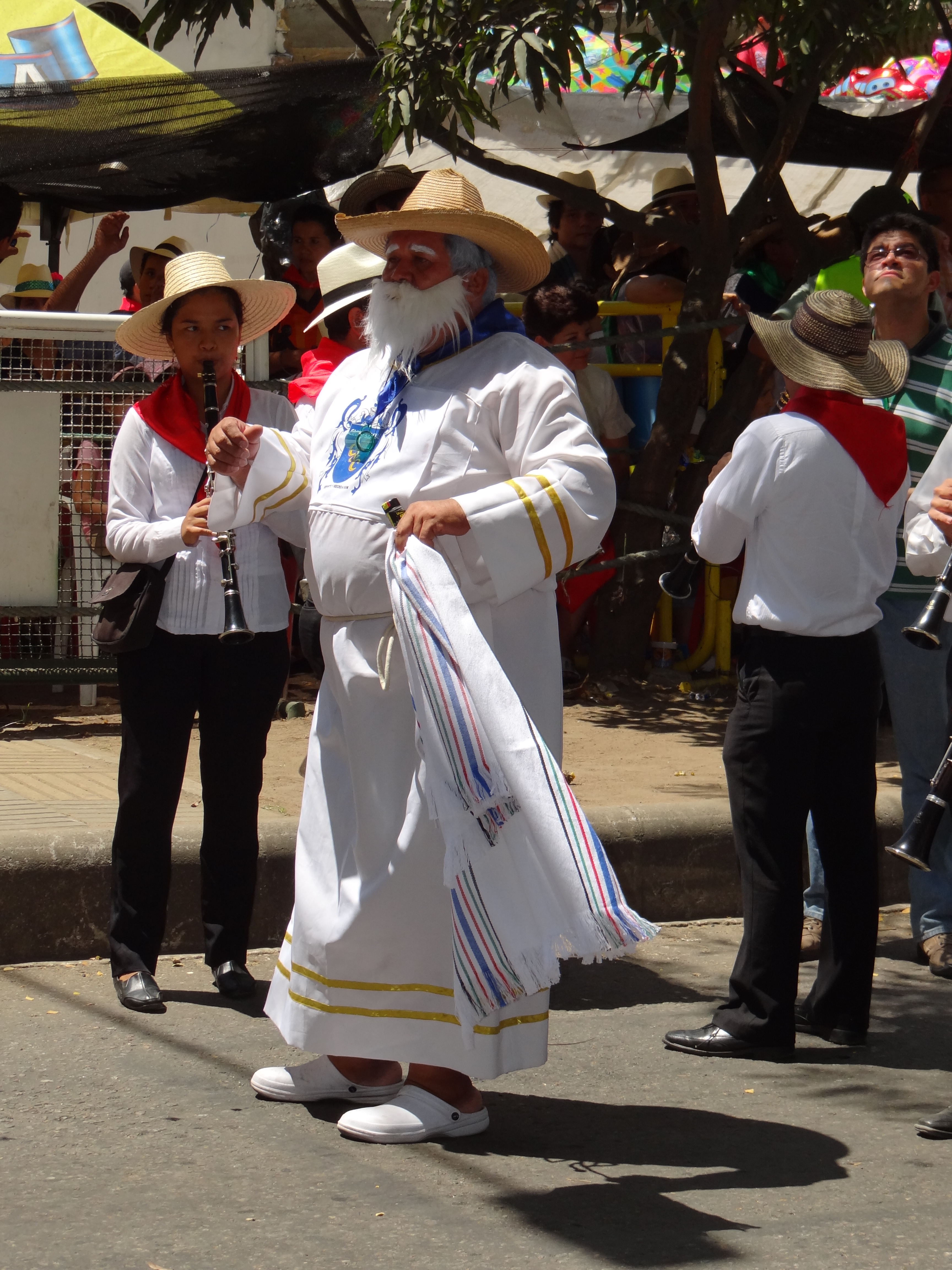 Fiestas de San Pedro en Neiva